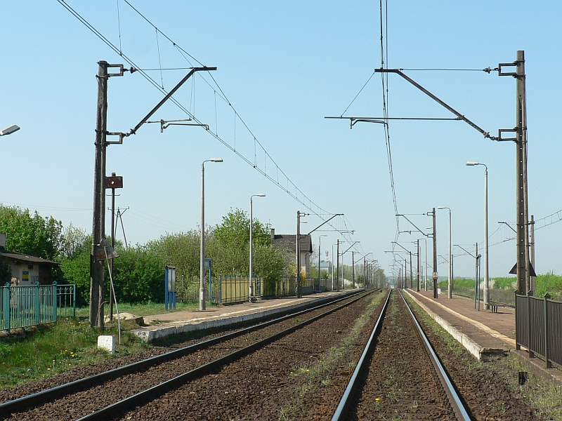 Perony na przystanku kolejowym Różyny